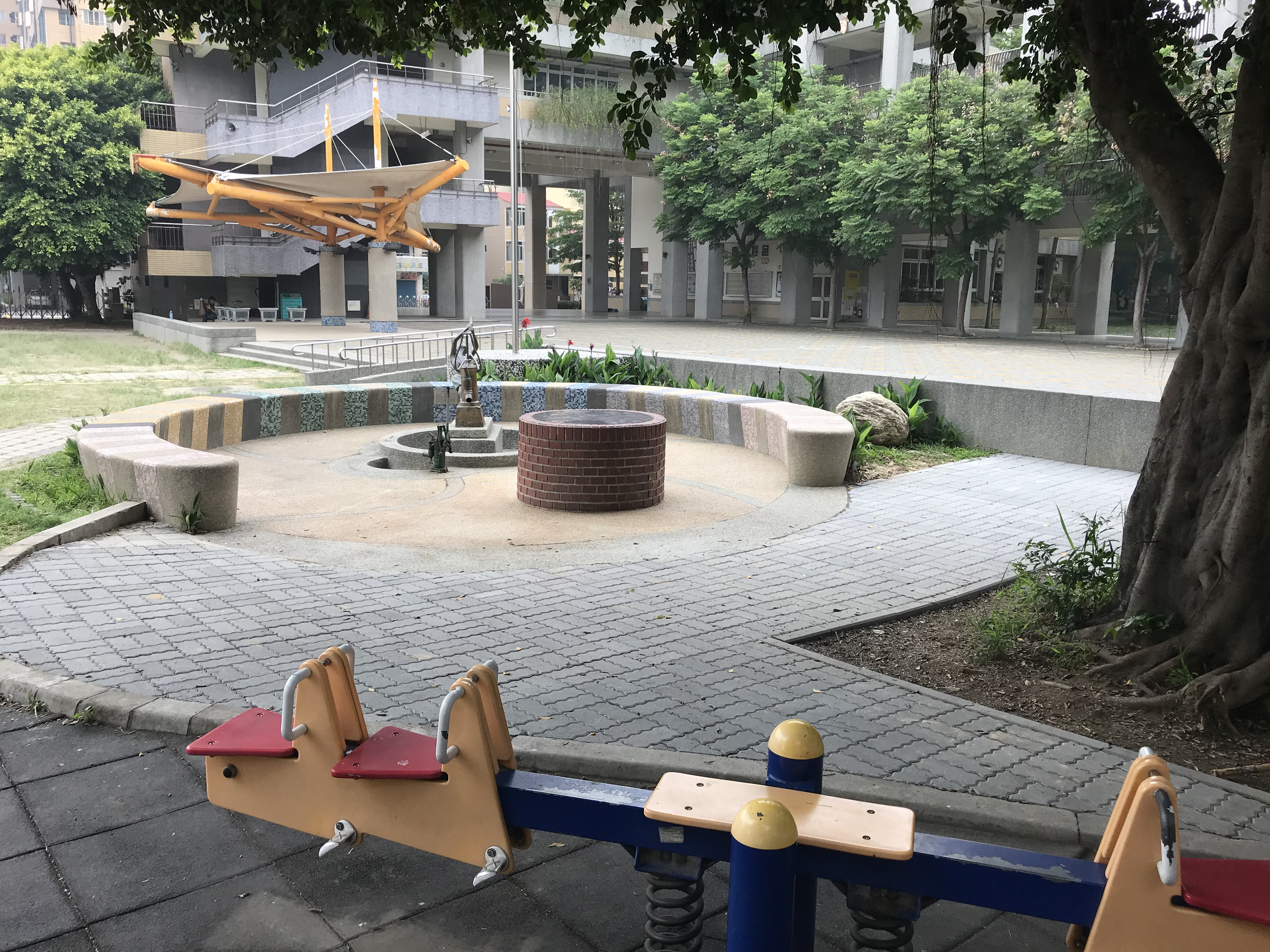 蓮蕉井遠景